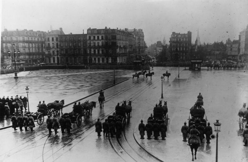 Frankreich, Lille, Militärparade Weltkrieg 1915. Dezember Im besetzten Nordfrankreich. Parade auf dem Platz der Republik in Lille. 23951-15